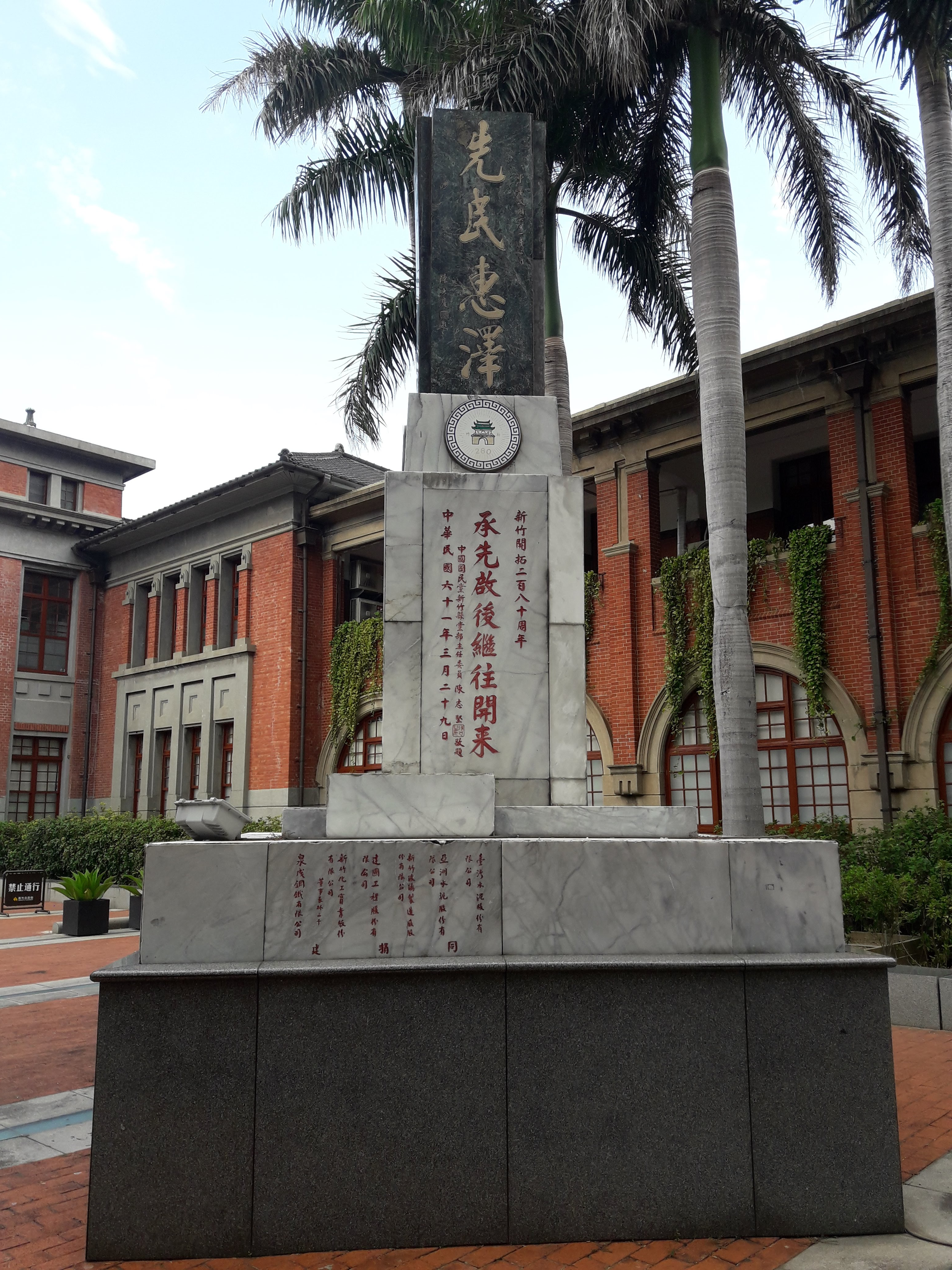 中文（台灣）: 新竹州廳建築前的新竹開拓280週年紀念碑，其中一面有中國國民黨新竹縣黨部主委陳志堅所題「承先啟後，繼往開來」。2018年7月22日攝於中華民國臺灣省新竹市。